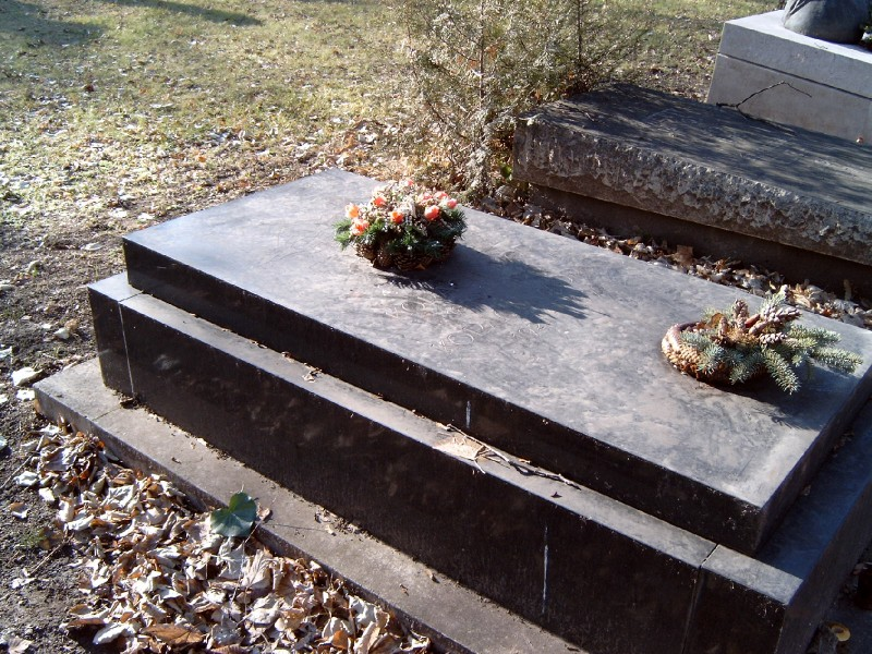 Korach Mór (Miskolc, 1888. febr. 8. – Bp., 1975. nov. 29.): vegyészmérnök, egyetemi tanár sírja Budapesten. Kerepesi temető: 34/2-1-29.